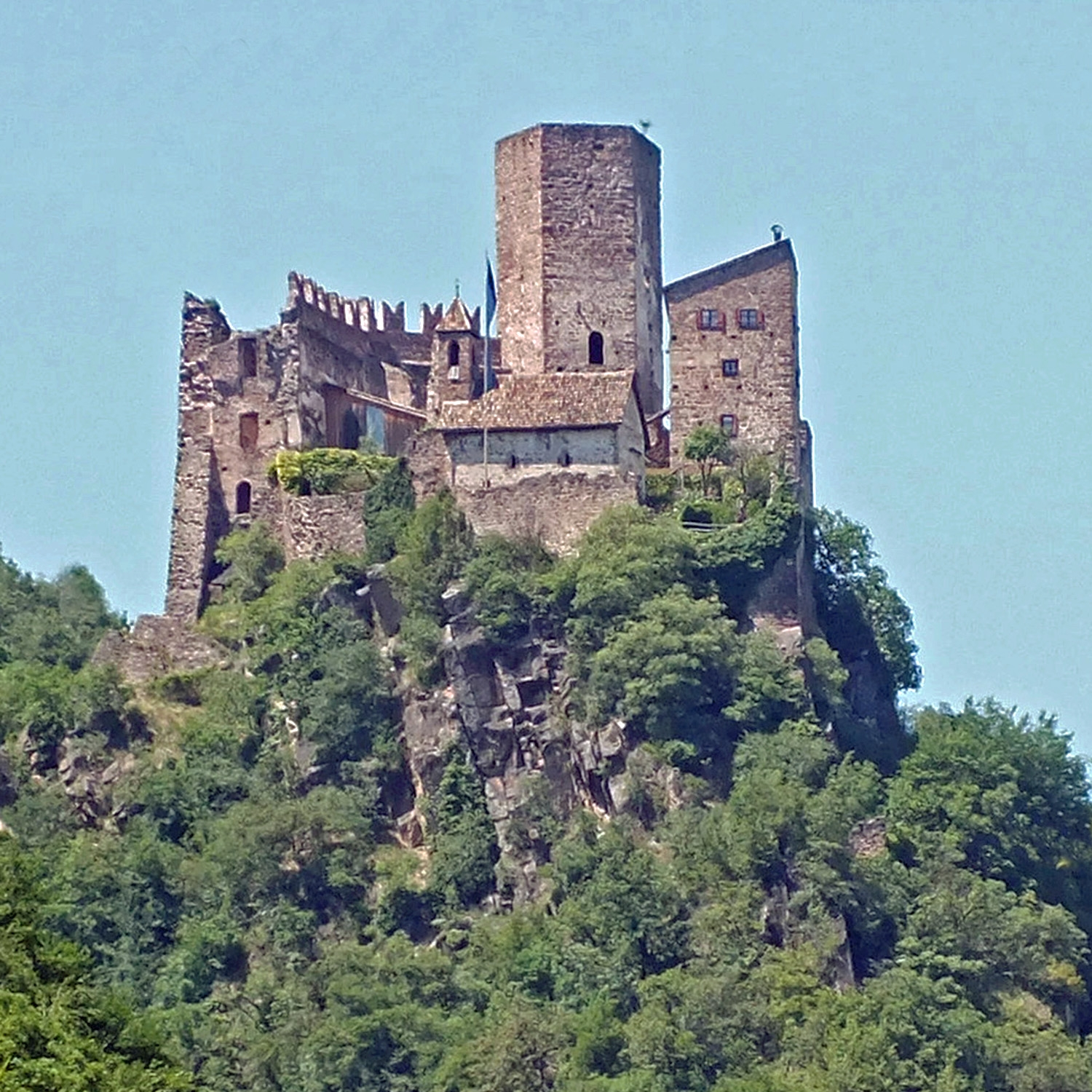 Die Burg Hocheppan von Schloss Korb aus, in Eppan, Südtirol